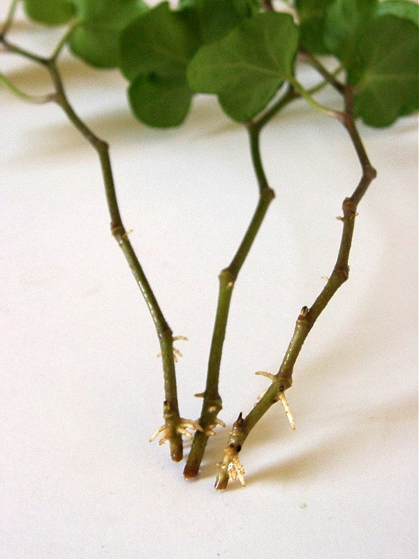 Sticklingar med små rötter. Foto: Användare:Chrizz